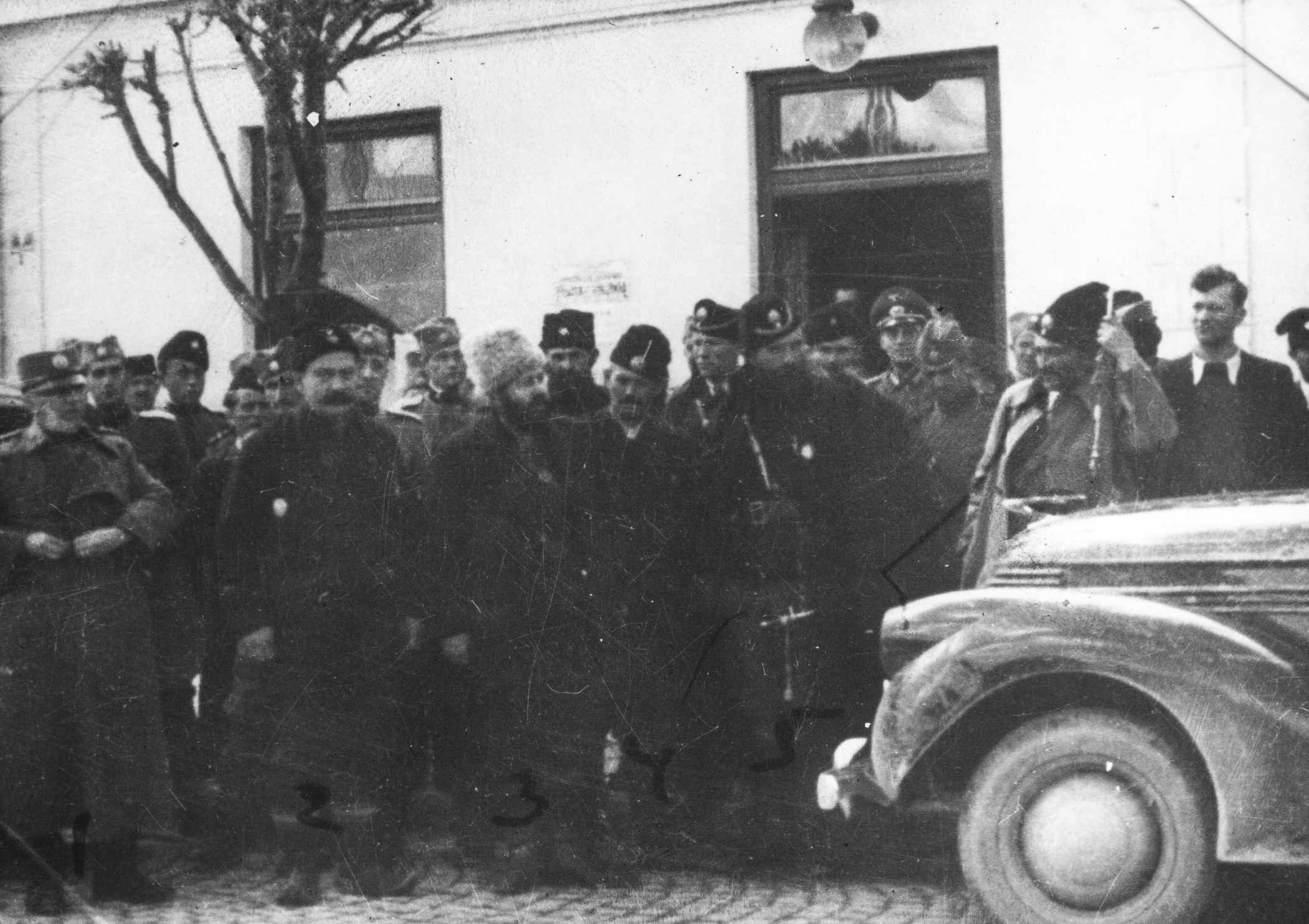 Srpskohrvatski / српскохрватски: Mihailovićevi komandanti sa okupatorom (s leva na desno): 1) Pukovnik Lučić, 2) četnički komandant, major bivše jugoslovenske vojske Jezdimir Dangić, 3) Mihailovićev komandant u Dalmaciji Ilija Trifunović-Birčanin, 4) Milorad Ljanovski, 5) četnički komandant Daka Tešanović, i 6) poručnik Ignjatović. Na vratima stoji nemački oficir.